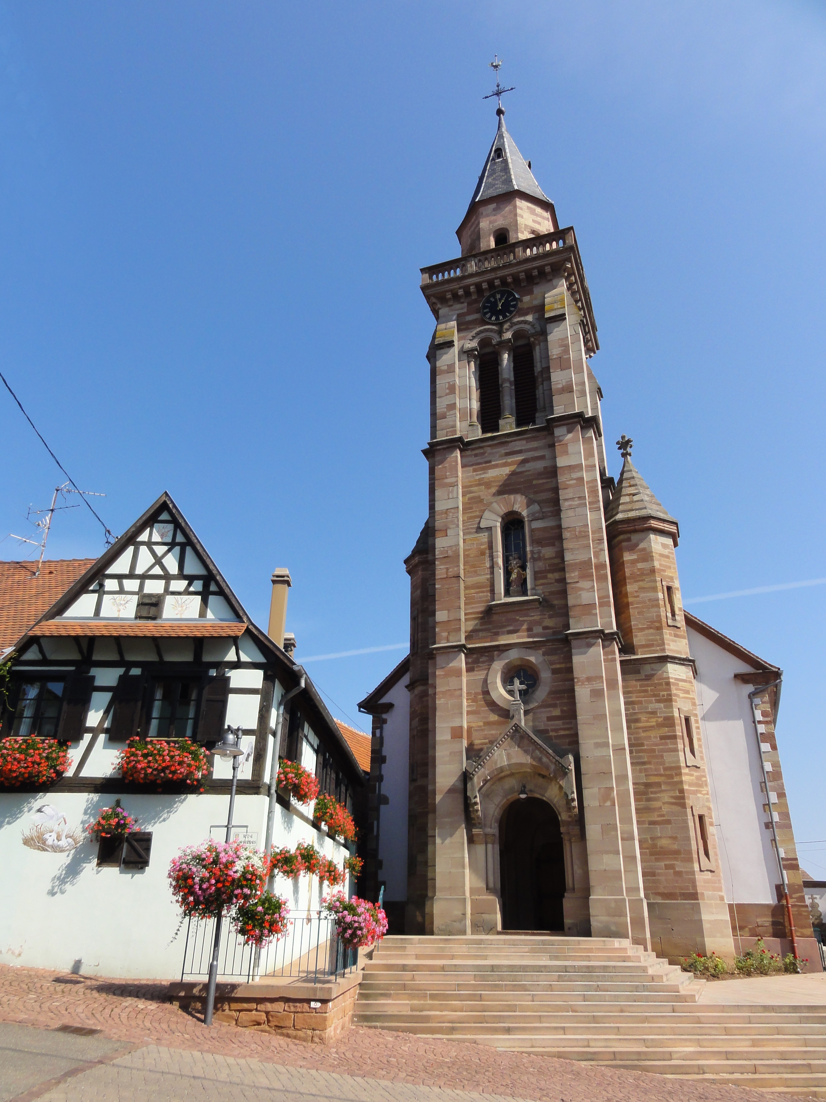 Alsace, Bas-Rhin, Nordheim, Église Saints-Pierre-et-Paul (IA67006607).